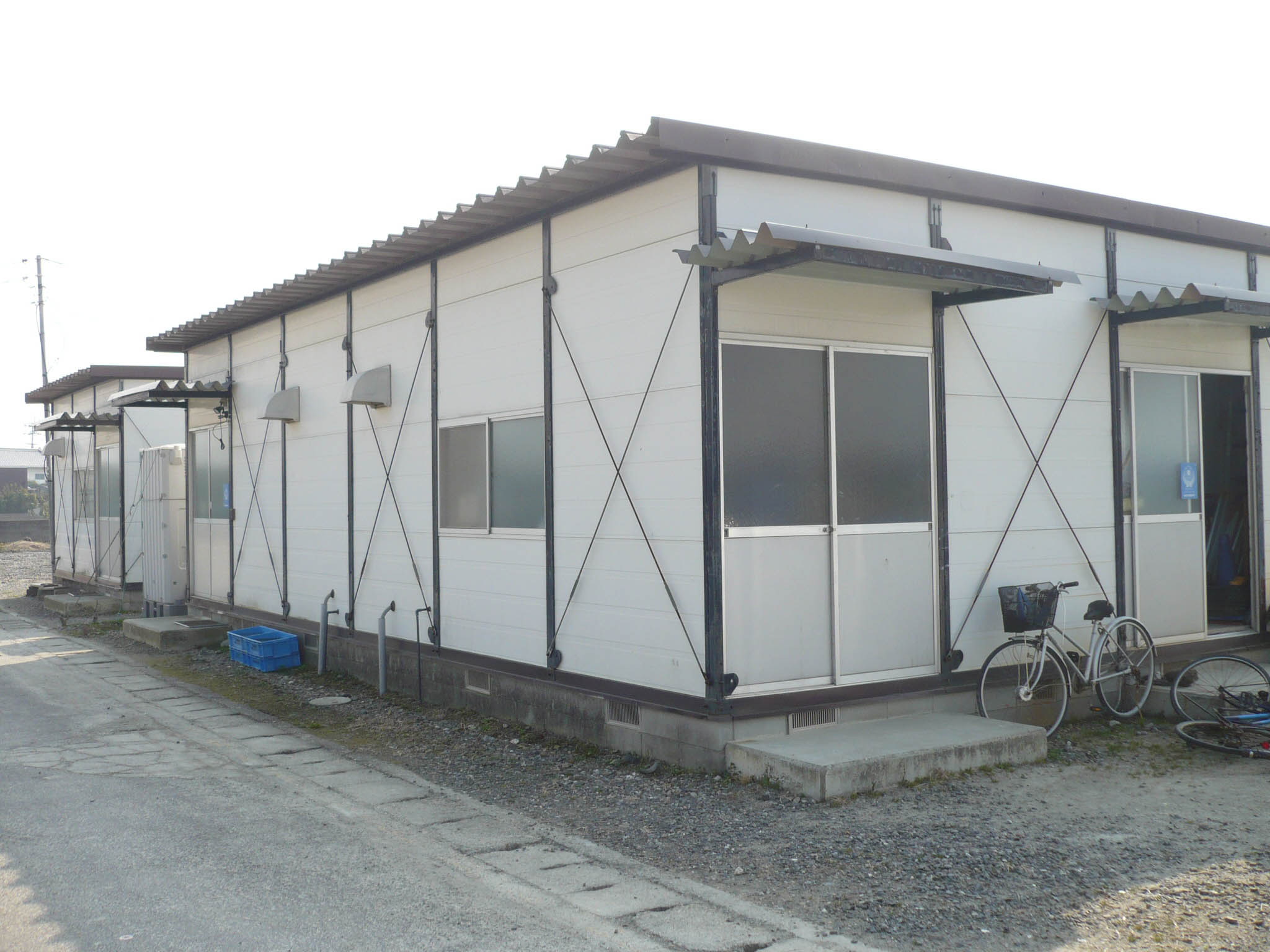 居館跡